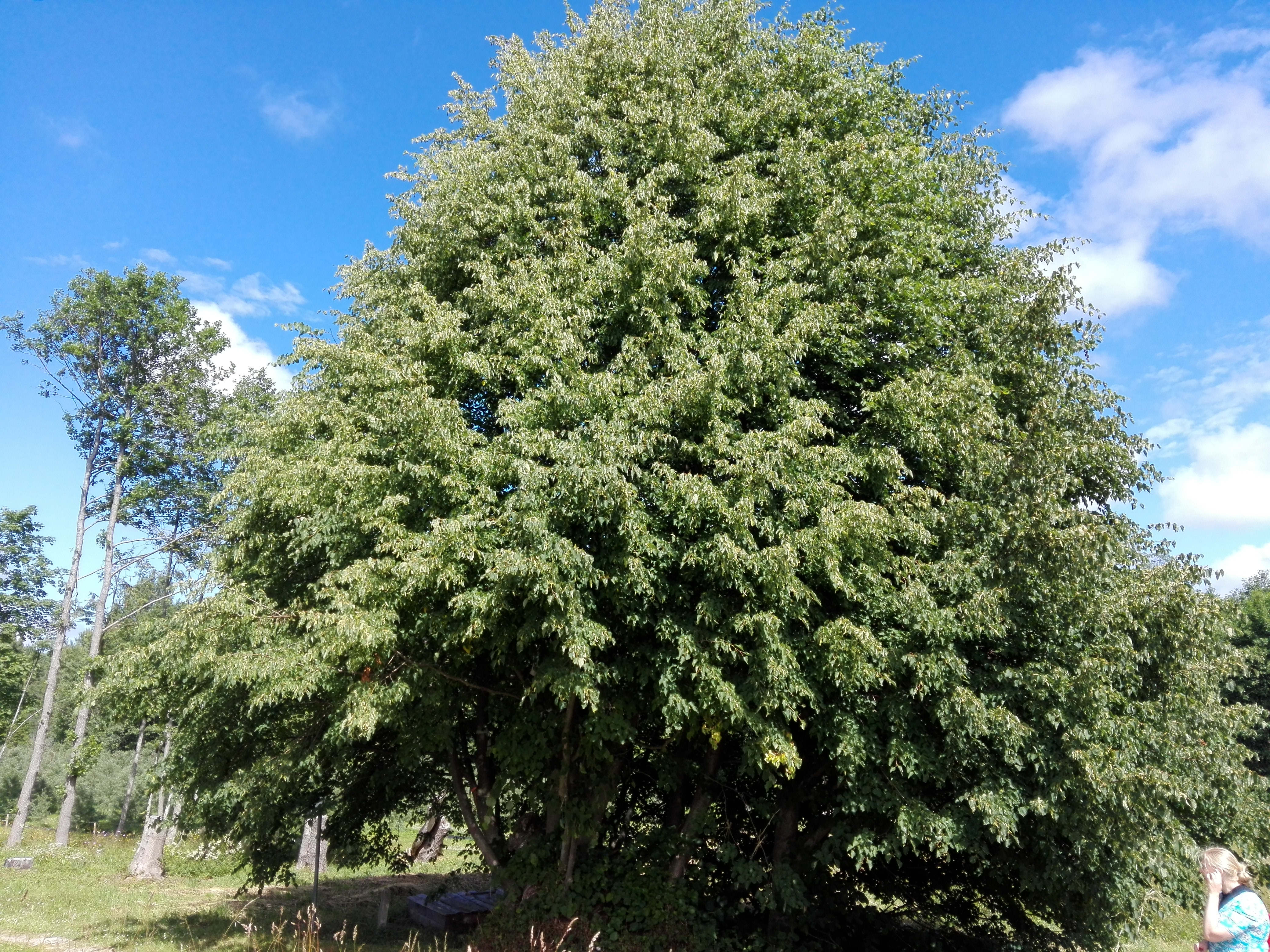 Ülendi ohvripärn Hiiumaal Ülendi külas